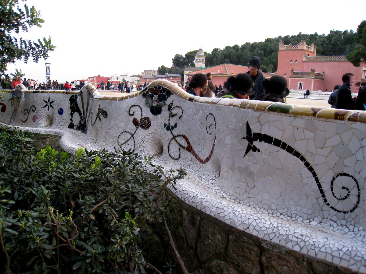 Parc Güell (Barcelona). Signatura de Josep Maria Jujol, autor del banc ondulant del parc